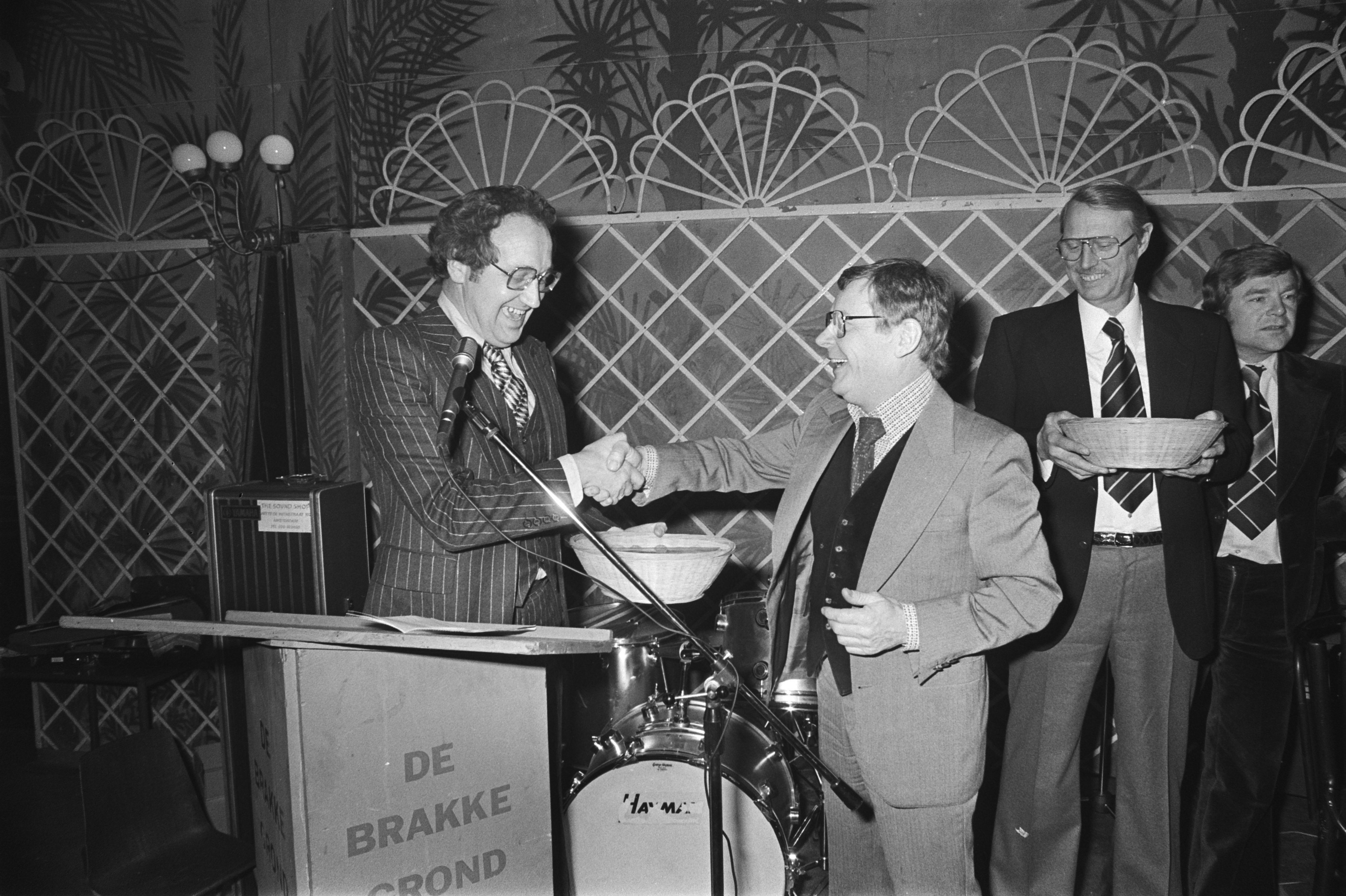 Collectie / Archief : Fotocollectie Anefo Reportage / Serie : [ onbekend ] Beschrijving : Uitreiking gouden Notenkraker aan Toby Rix en Dutch Swing College Band door IJf Blokker ; v.l.n.r. IJf Blokker Datum : 17 januari 1977 Trefwoorden : Uitreikingen Persoonsnaam : Ijf Blokker, Schilperoort, Peter Fotograaf : Suyk, Koen / Anefo Auteursrechthebbende : Nationaal Archief Materiaalsoort : Negatief (zwart/wit) Nummer archiefinventaris : bekijk toegang 2.24.01.05 Bestanddeelnummer : 928-9831